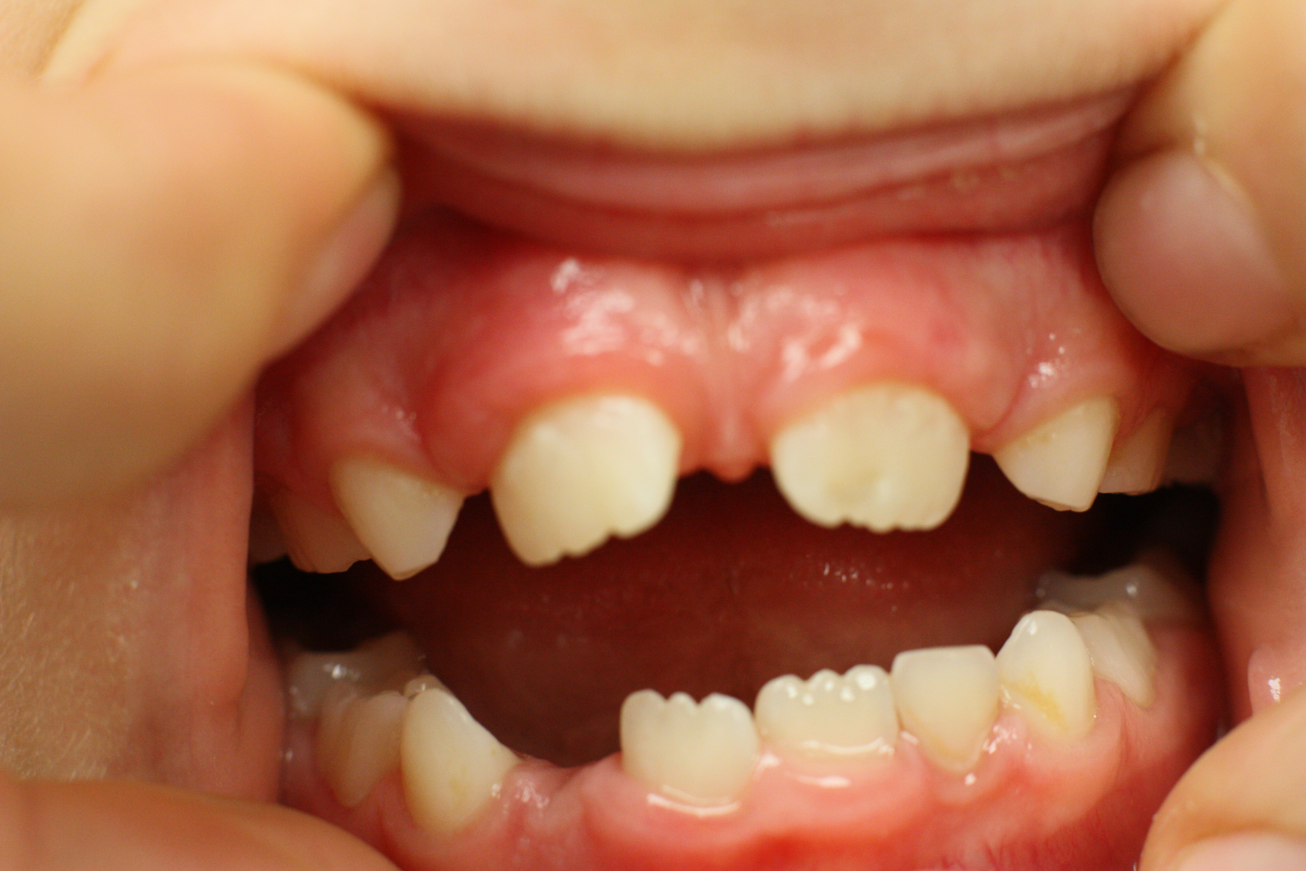 ZahnTrema zwischen den bleibenden mittleren Schneidezähnen Oberkiefer, Wechselgebiss